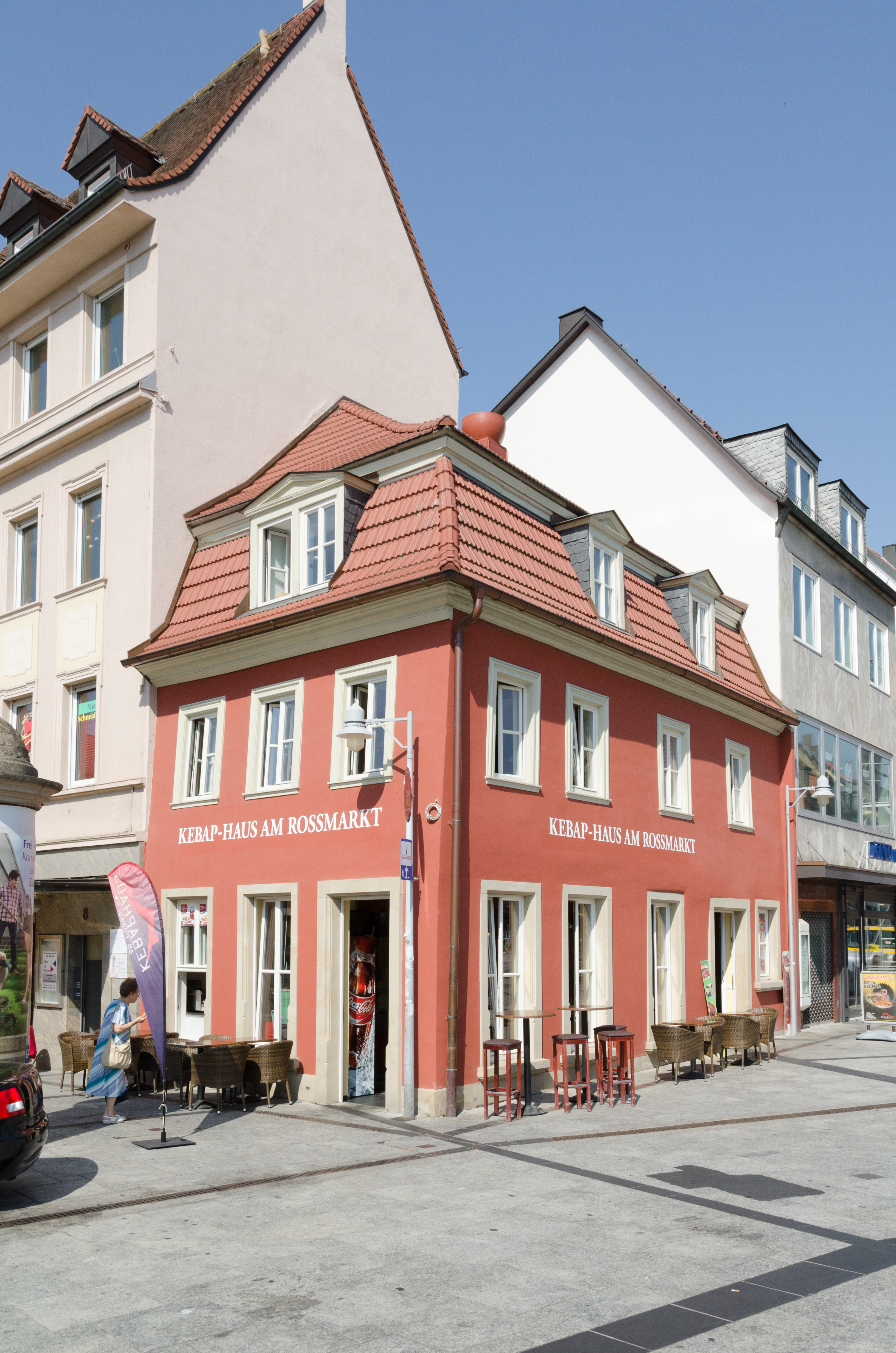 Schweinfurt, Wolfsgasse 1